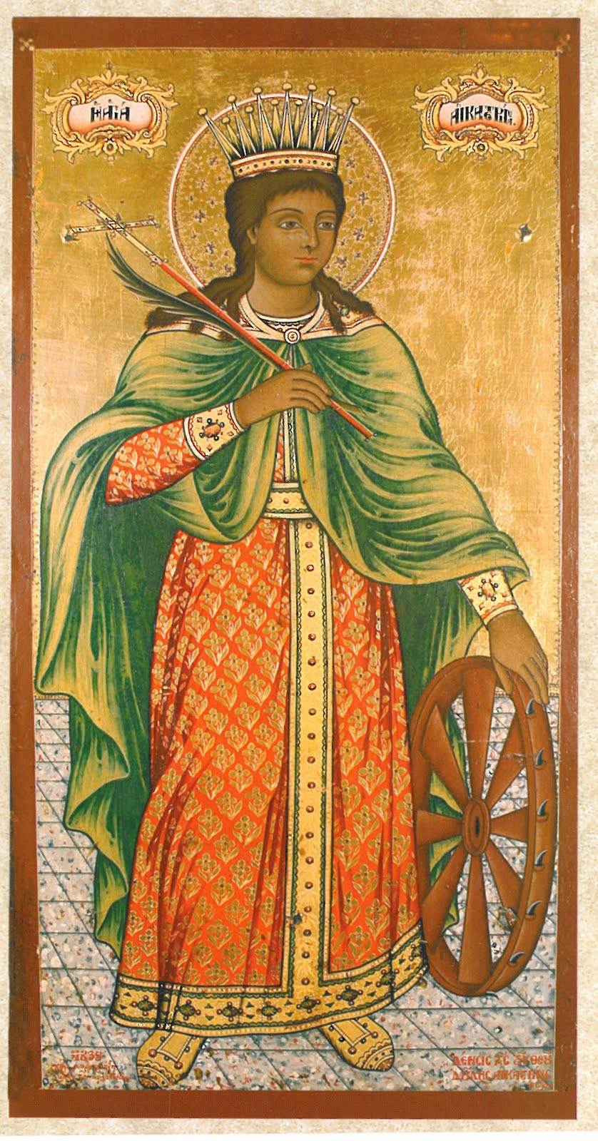 Икона на Света Екатерина от Маргаритис Ламбу.